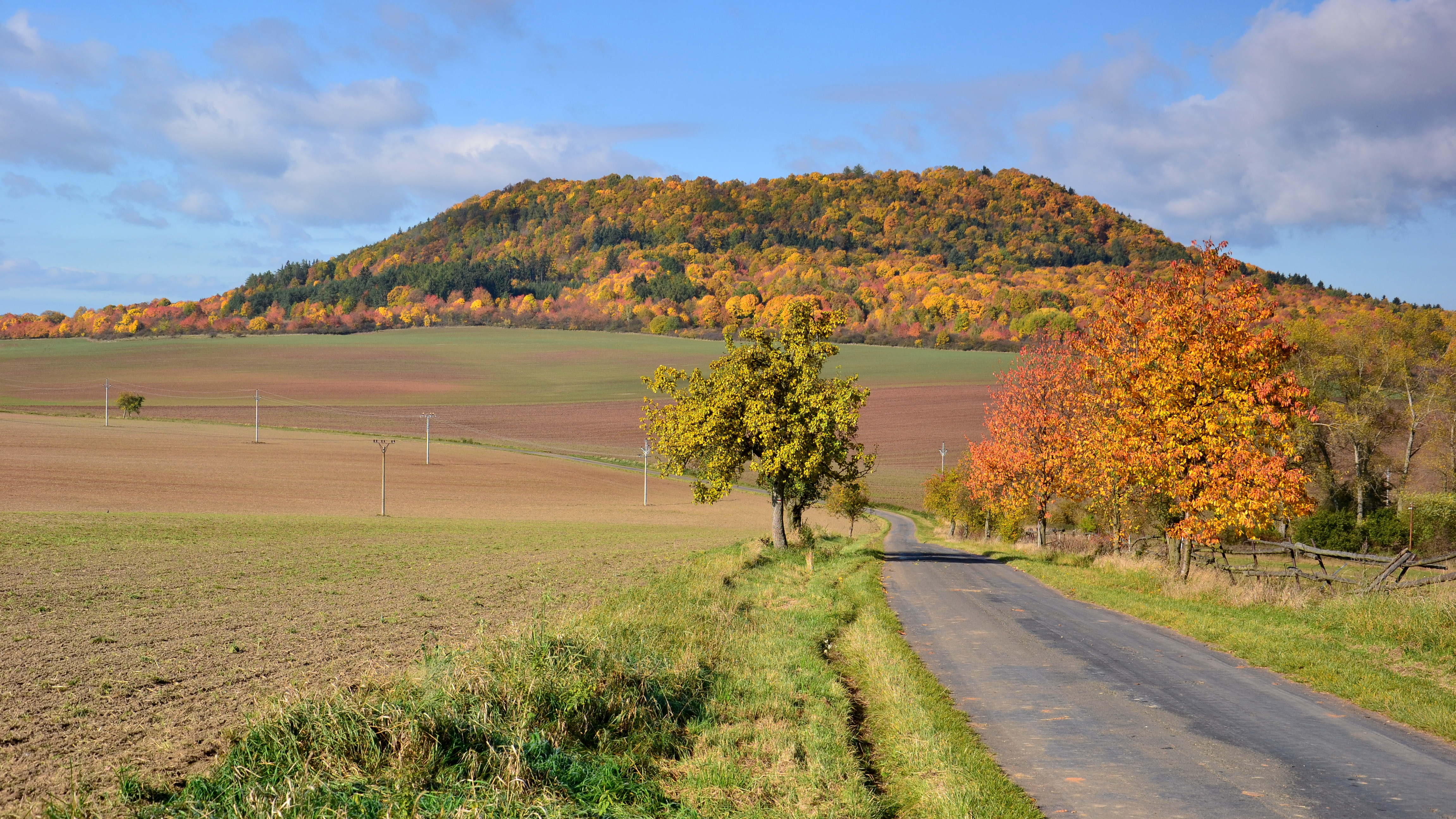 Vladař – pohled z jihovýchodu (od Bohuslavi)